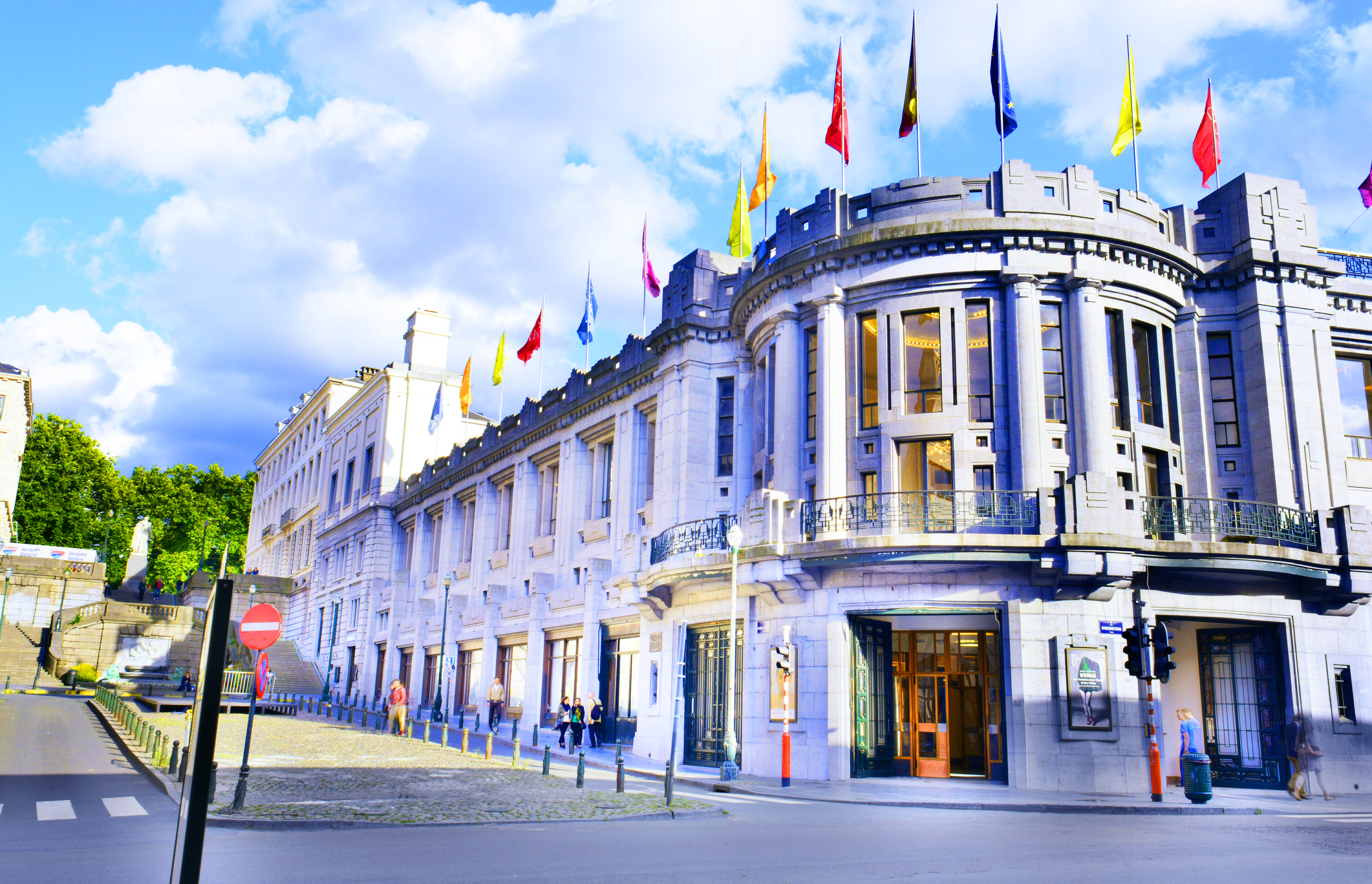 Palais des Beaux-Arts, aussi appelé Bozar